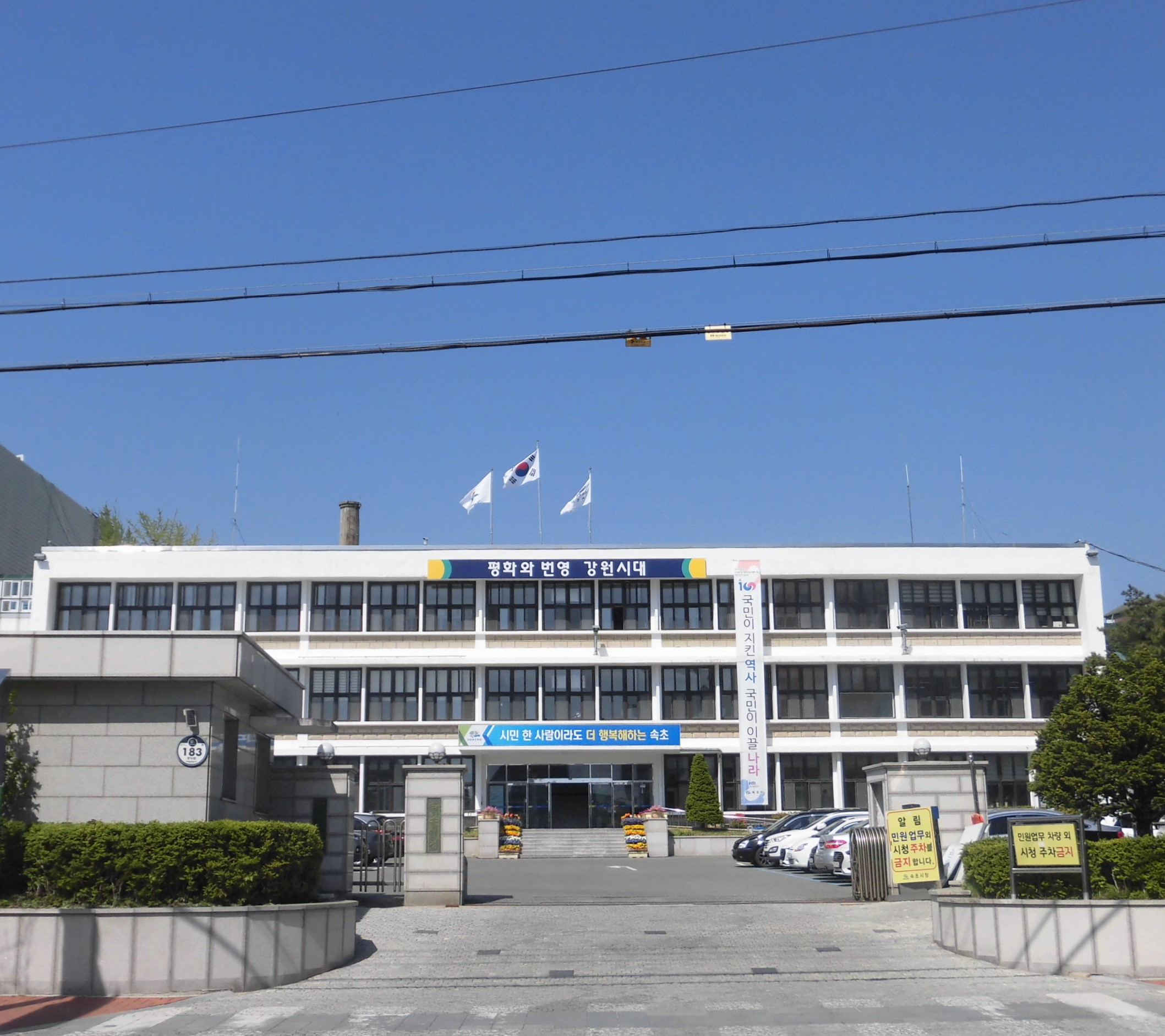 강원도 속초시에 있는 속초시청